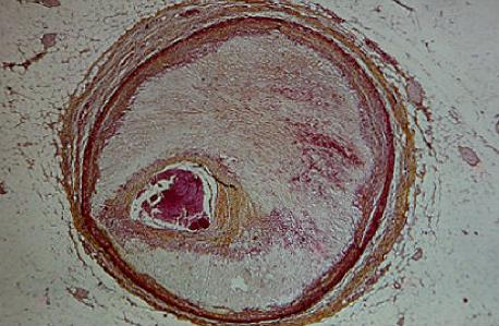 Fibröz bir aterom. kaynak: Giorgio Baroldi, Riccardo Bigi and Lauro Cortigiani (2004) Cardiovascular Ultrasound 2:29 "Ultrasound imaging versus morphopathology in cardiovascular diseases. Coronary atherosclerotic plaque." [1] Figure 4B / Şekil 4B.